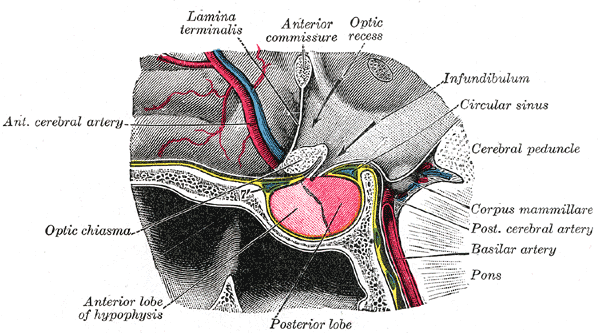 Pituitary gland